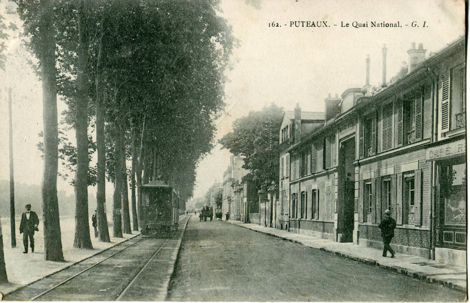 Carte postale ancienne éditée par G. I., n°162 PUTEAUX - Le Quai National Vue d'un tramway de la ligne no 3 Mairie de Pierrefitte - Pont de Saint-Cloud des TMEP